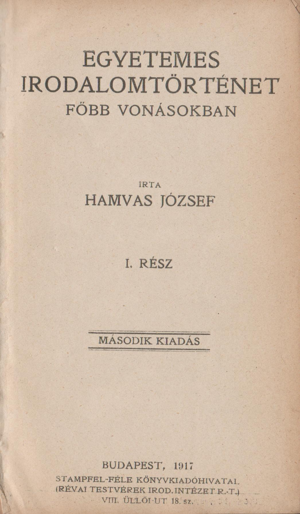 Az adott mű címlapja.